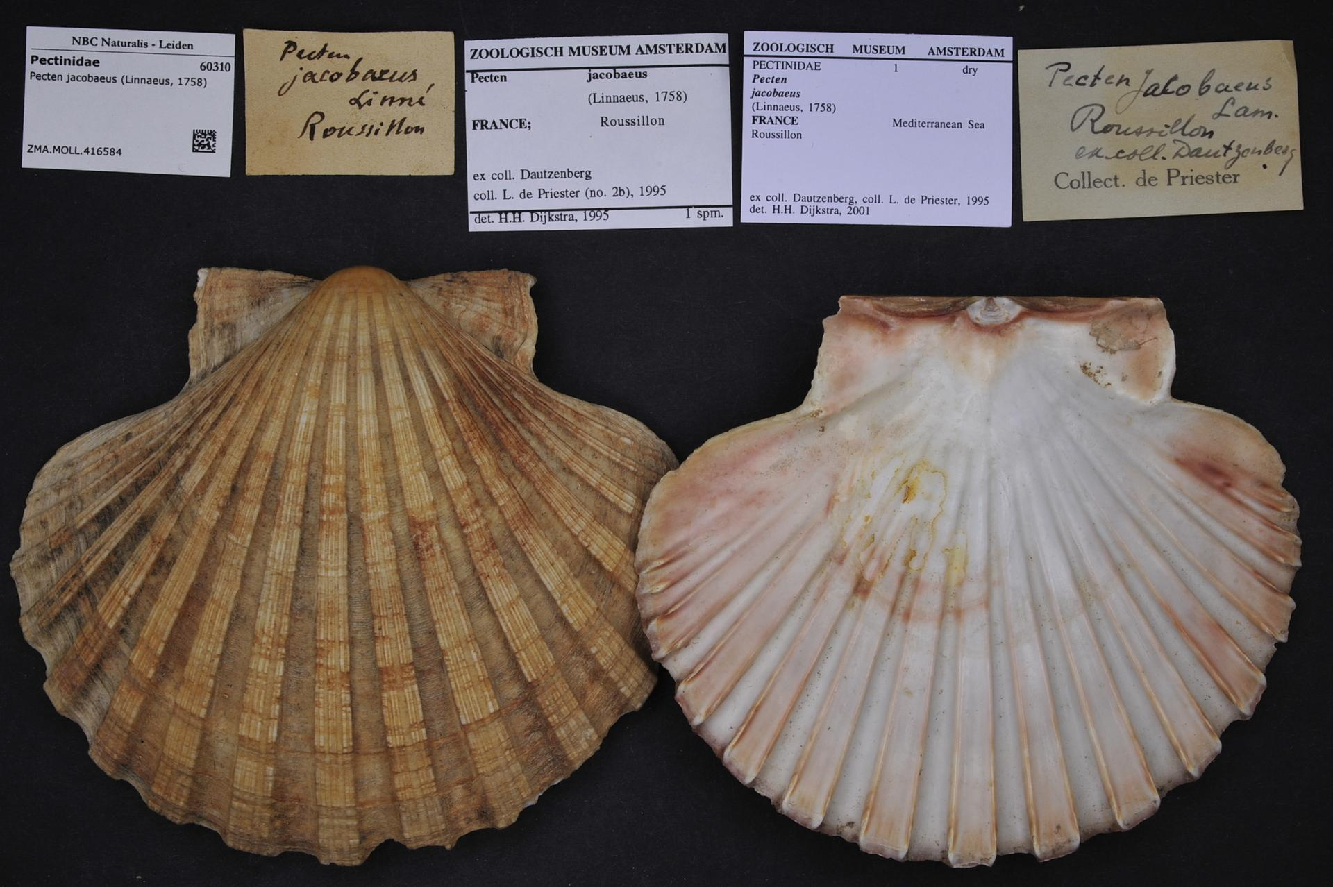 Pecten jacobaeus (Linnaeus, 1758)